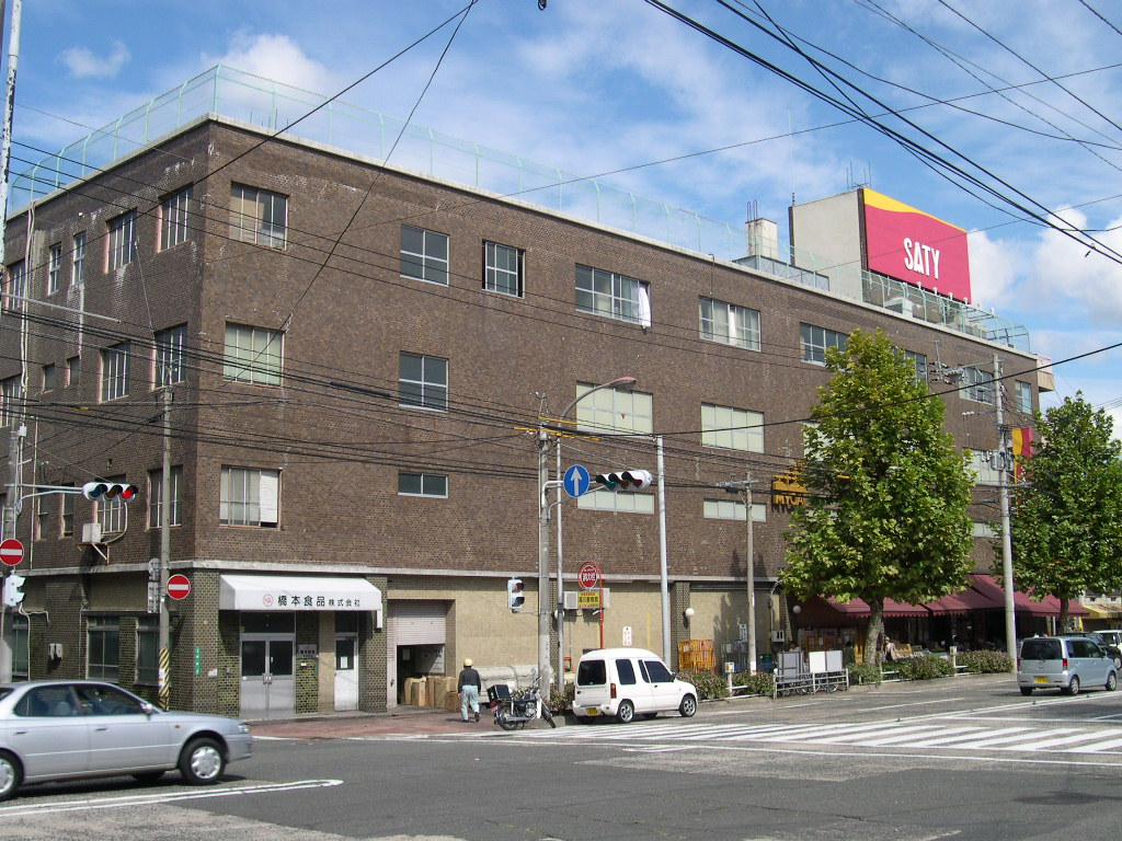 2003年10月撮影